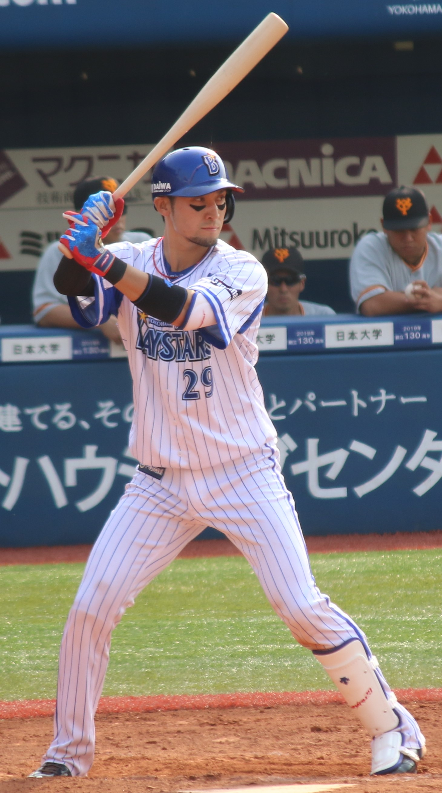 横浜DeNAベイスターズ 捕手 伊藤光 横浜スタジアム